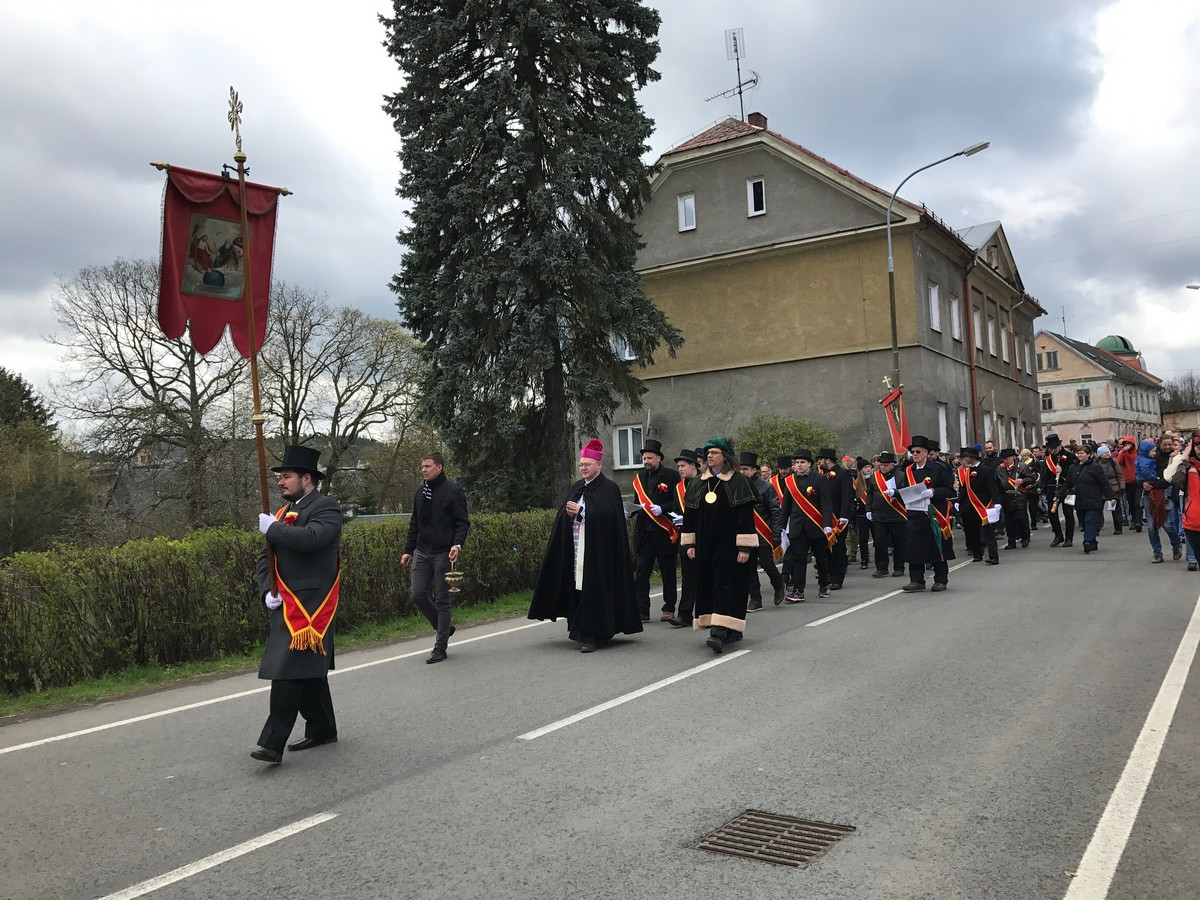 Velikonoční jízda na Velikonoční neděli 16. dubna 2017 v Mikulášovicích